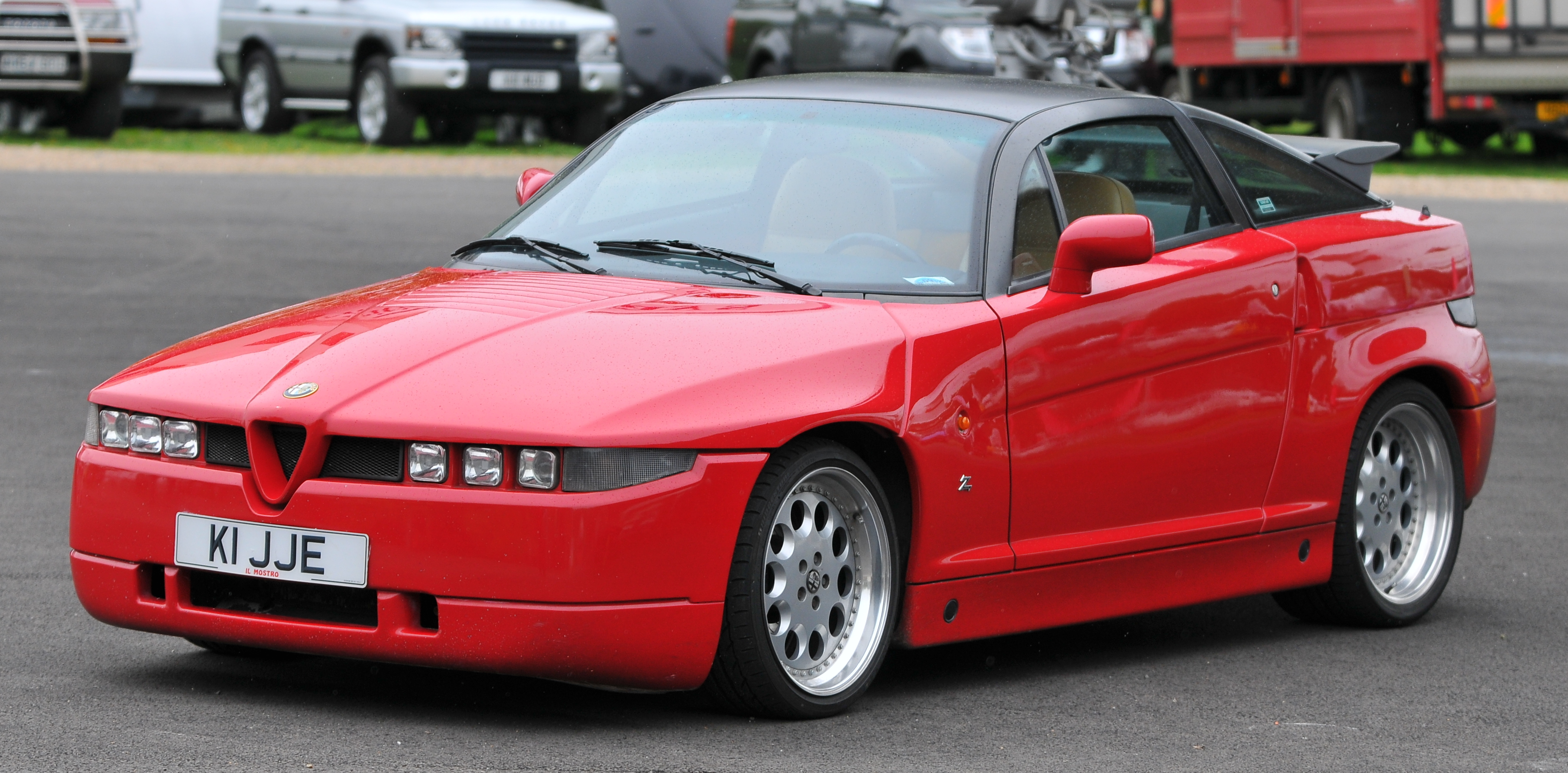 AutoItalia Brooklands May 2012